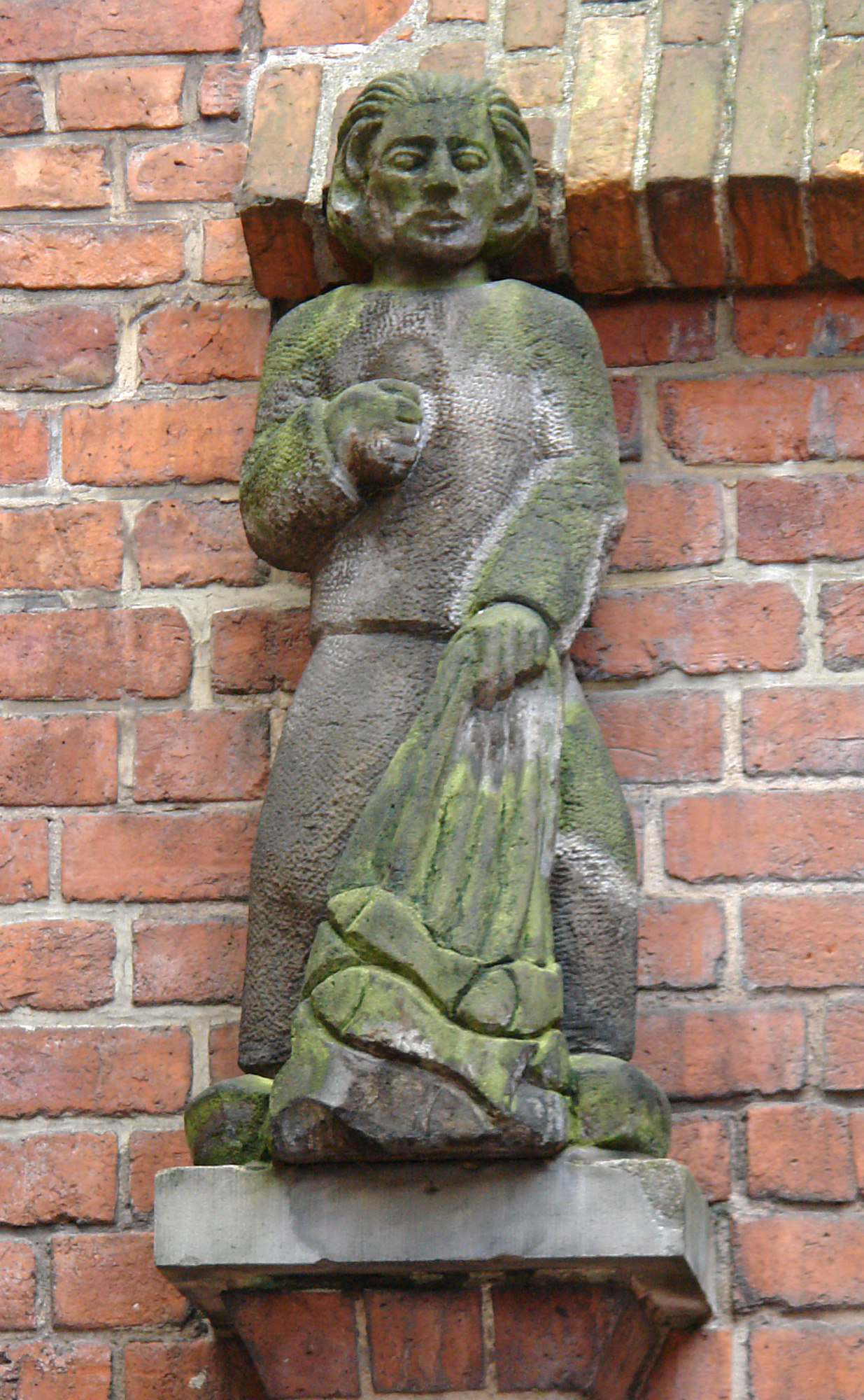 Petrus als Fischer in Bremen, Böttcherstr. Haus Petrus.Das abgebildete Objekt ist ein geschütztes Kulturdenkmal in der Freien Hansestadt Bremen, mit der Nr. 1499,T001 beim Landesamt für Denkmalpflege registriert.